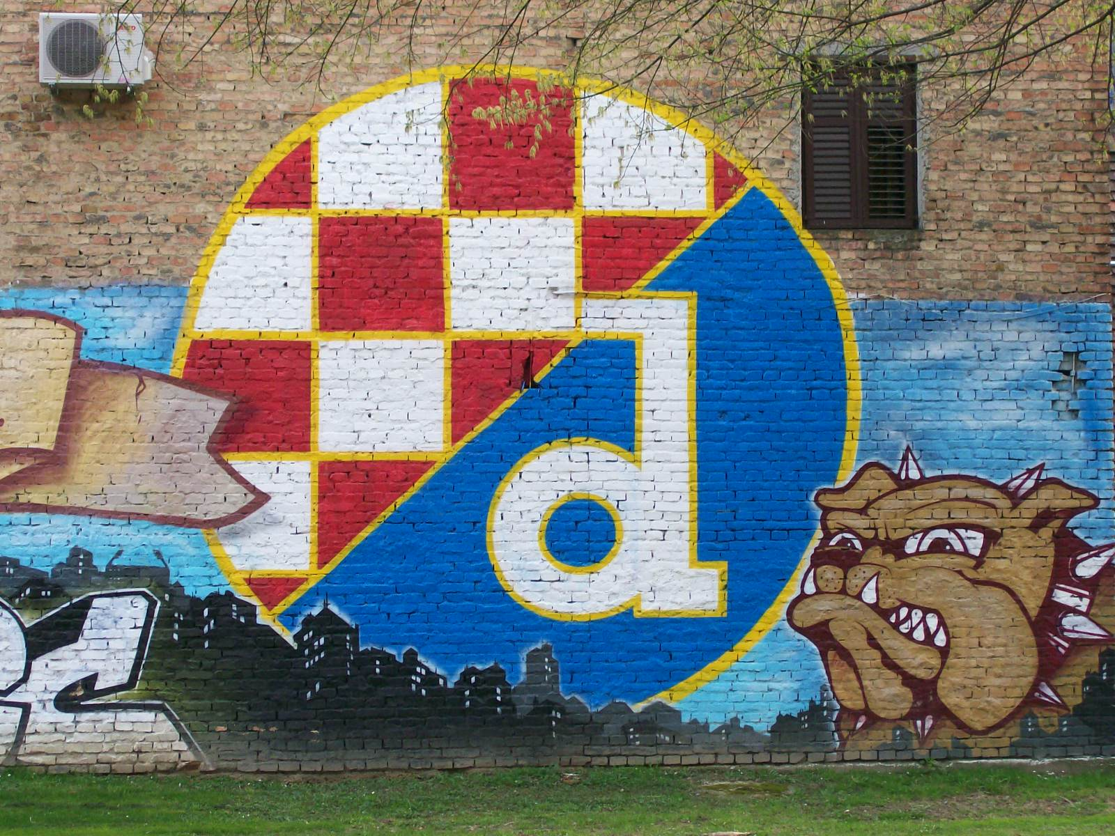 Grafit Dinamo Črnomerec